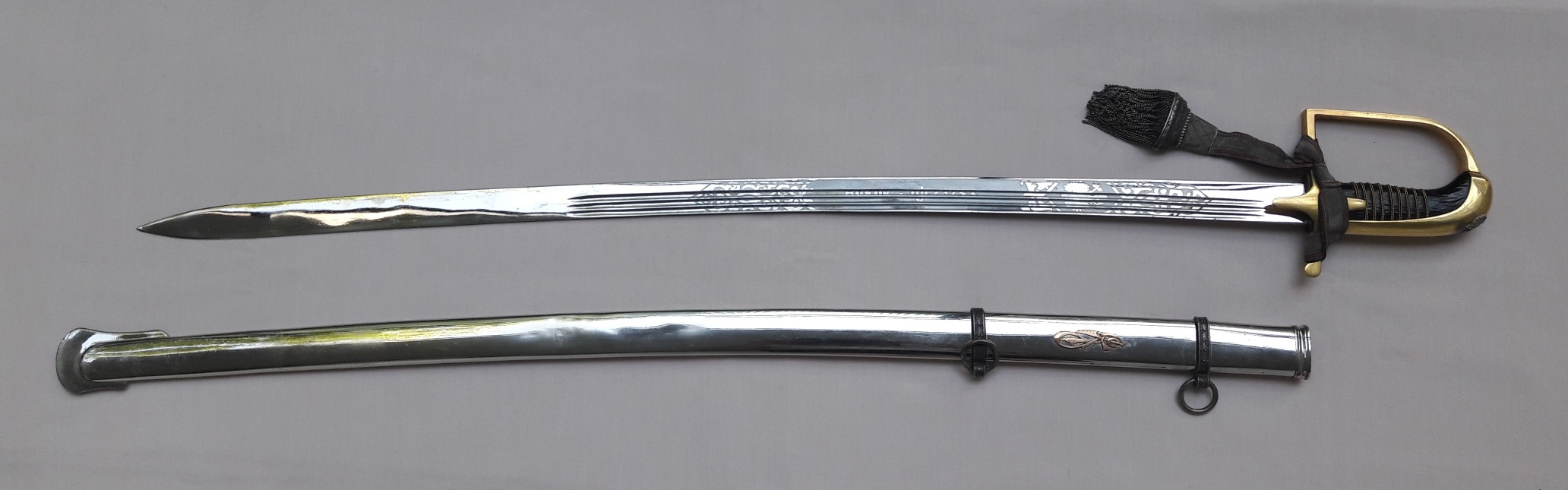 Polska szabla upominkowa wz.21 firmy G. Borowski; rok 1930.